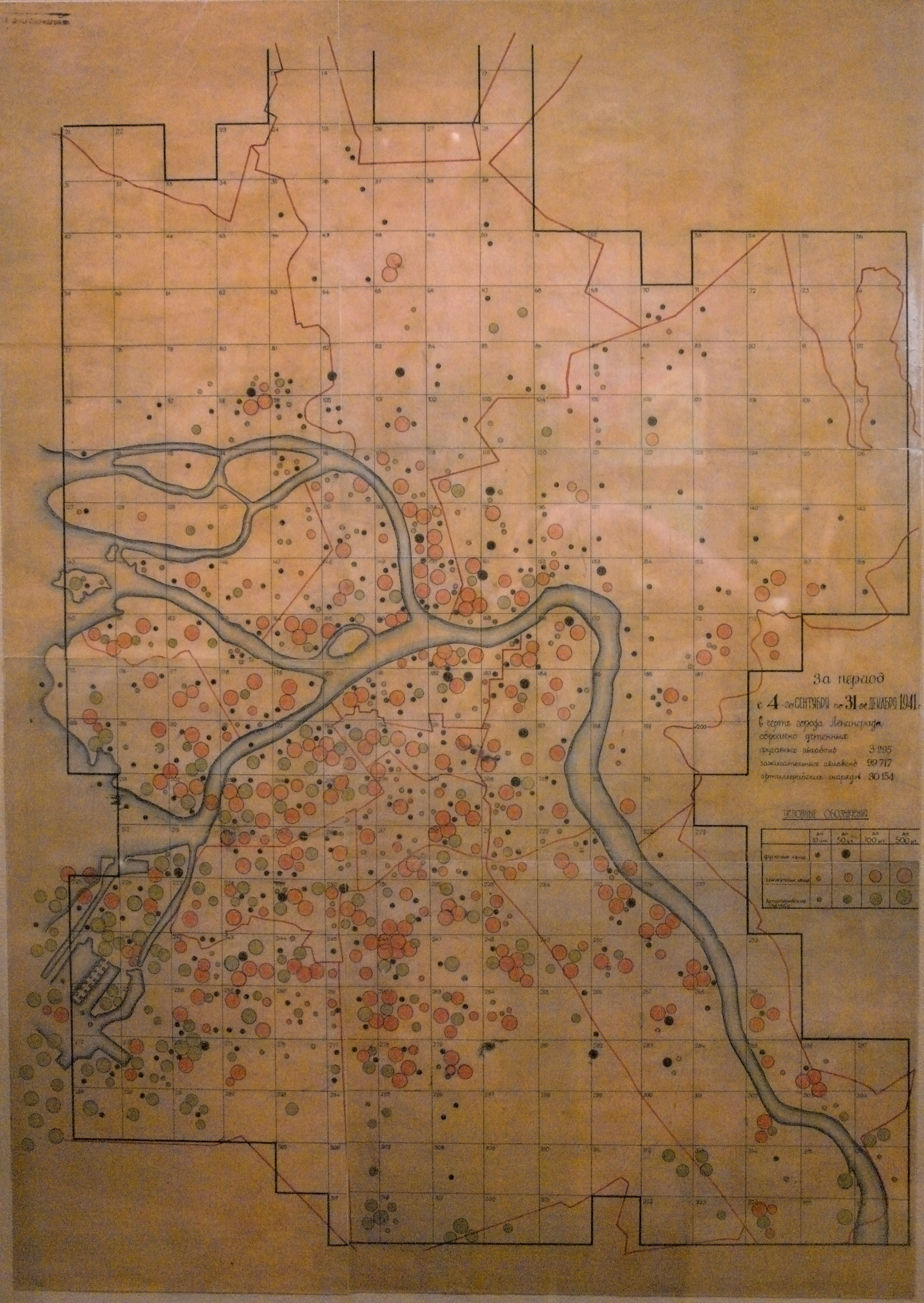 Карта бомбардировки Ленинграда во время блокады.